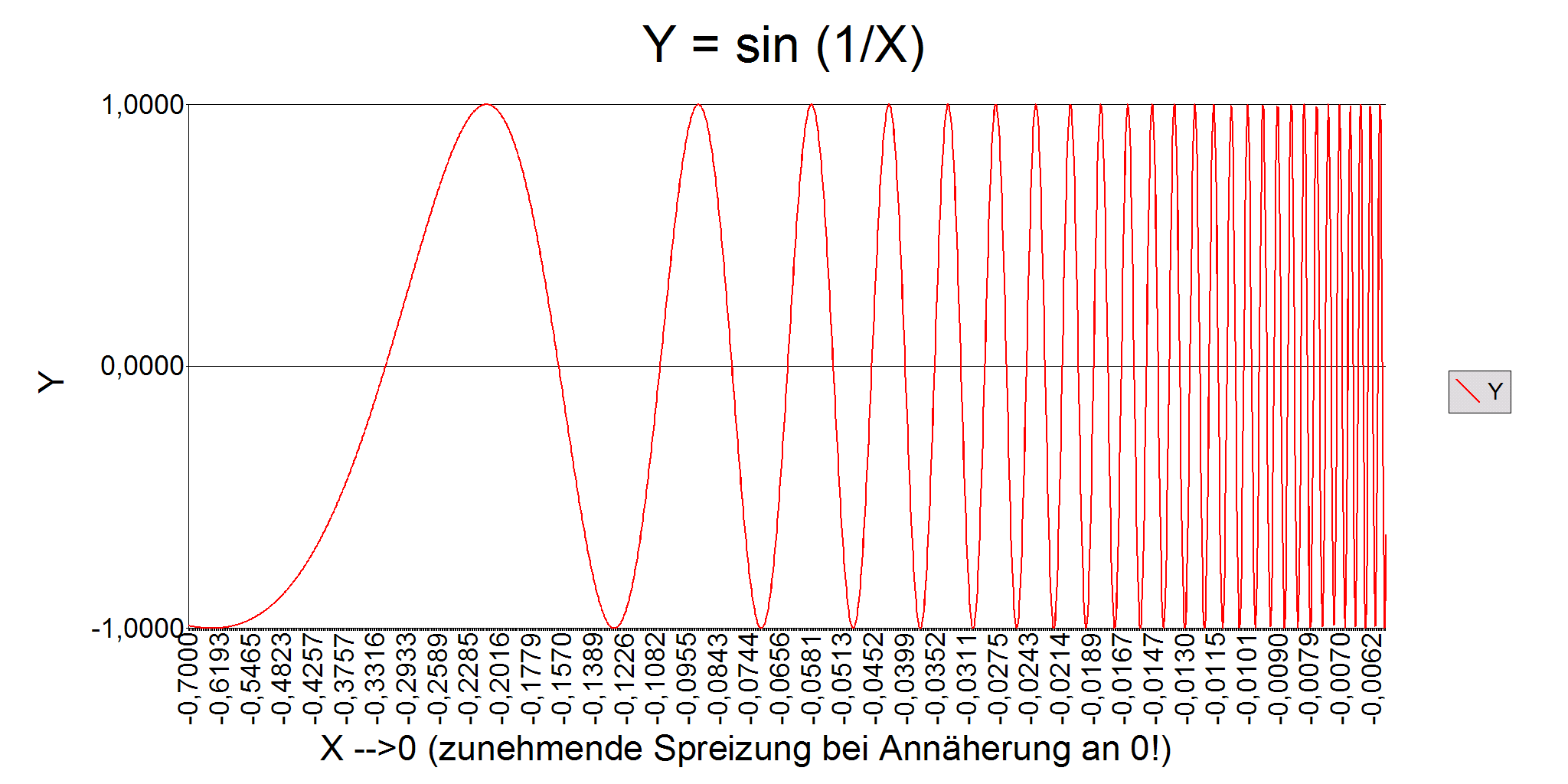 Unbeschränkte Variation der Funktion Y = sin (1/x)